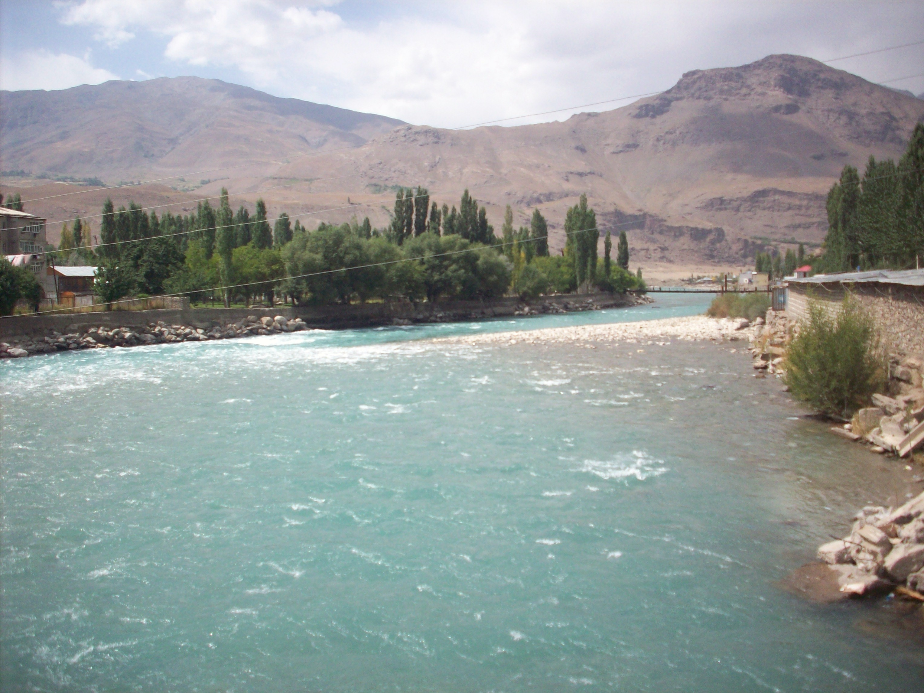 Khorog, Tajikistan